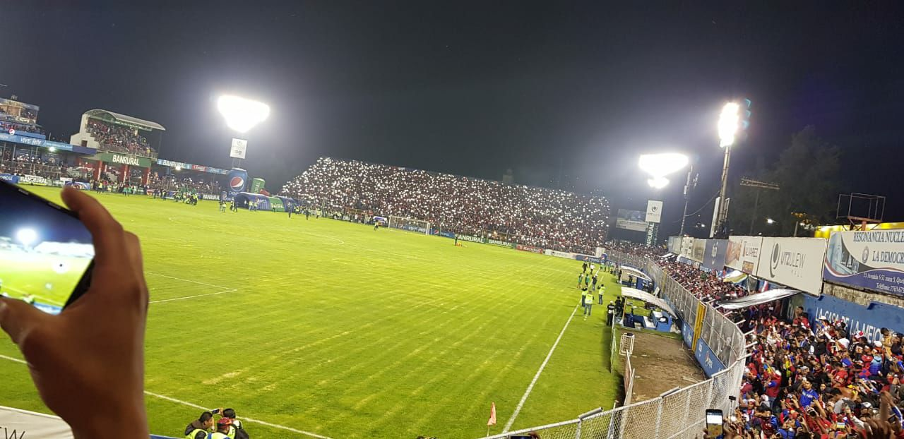 Vista desde el sector de la curva del estadio Mario Camposeco en la final de ida del Torneo Clausura 2018